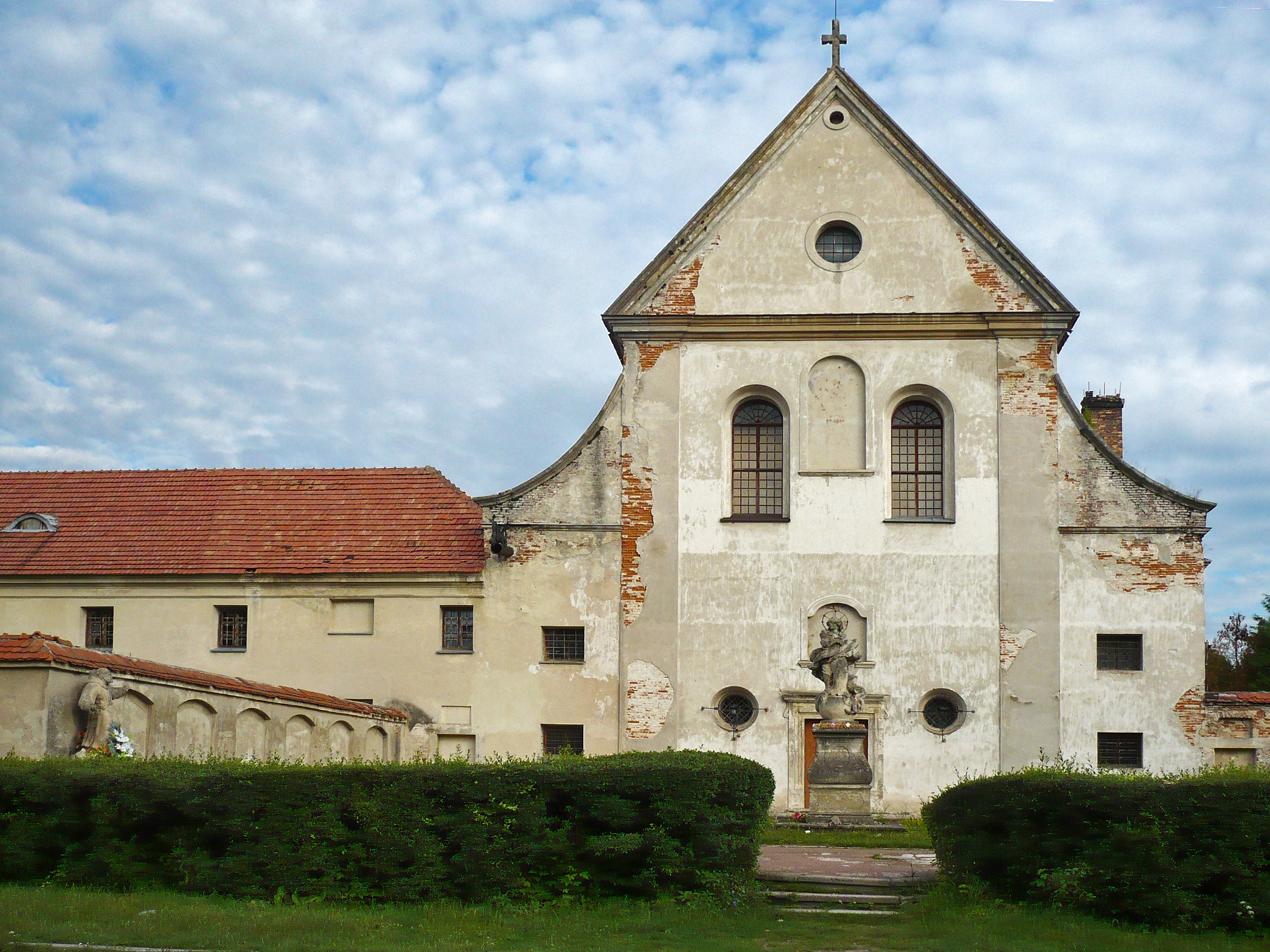 Klasztor oo. kapucynów w Olesku